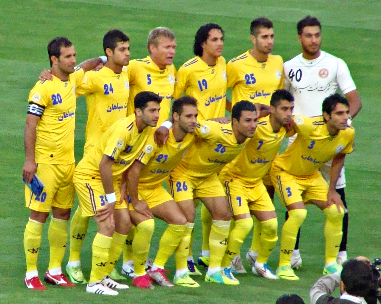 Iran: Naft Teheran (Saison 2011/12)